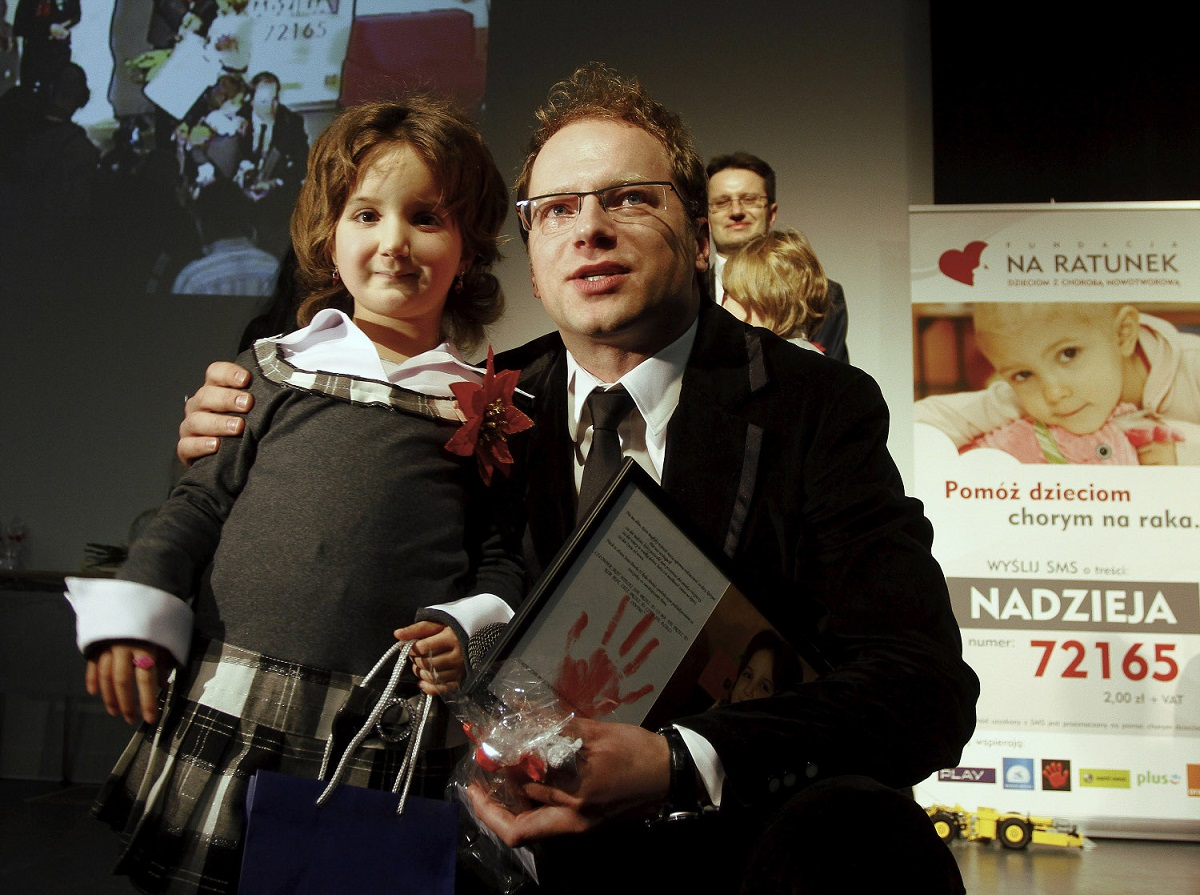 Fundacja "Na ratunek dzieciom z chorobą nowotworową"